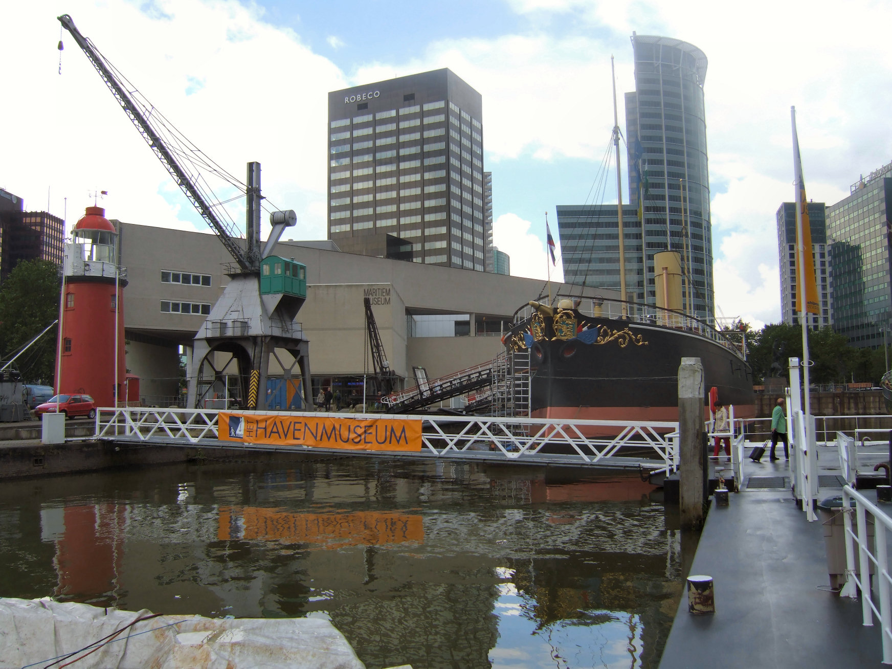 Maritiem museum in Rotterdam, gezien vanaf de Leuvehaven